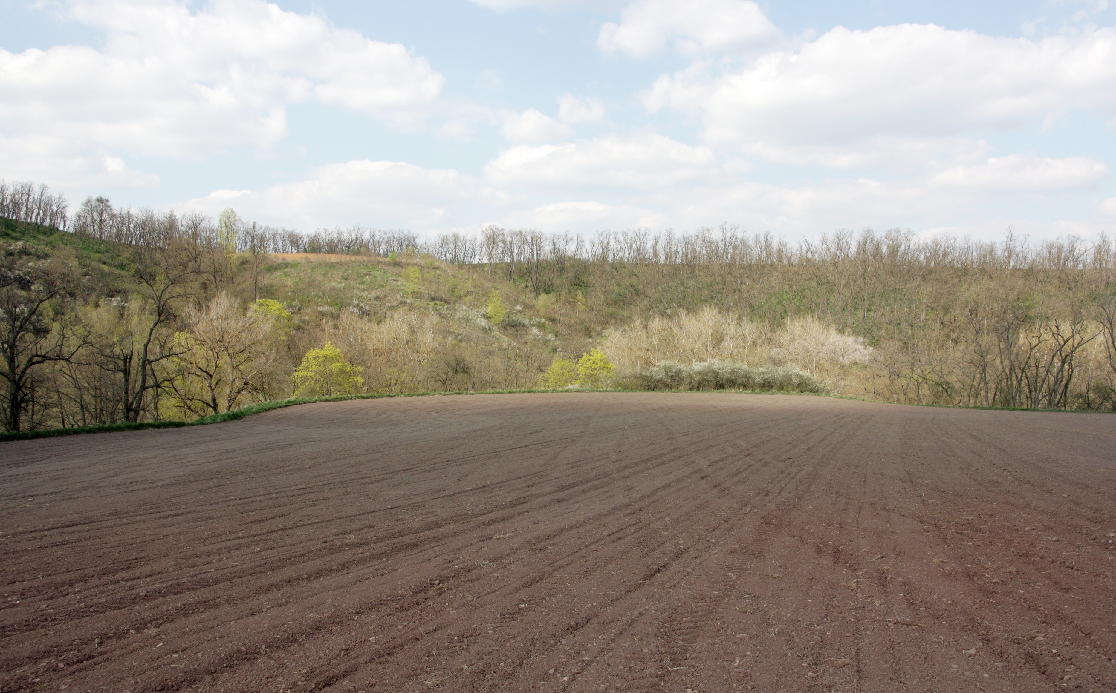 Rokytná (Moravský Krumlov) - hradiště Rokyten.